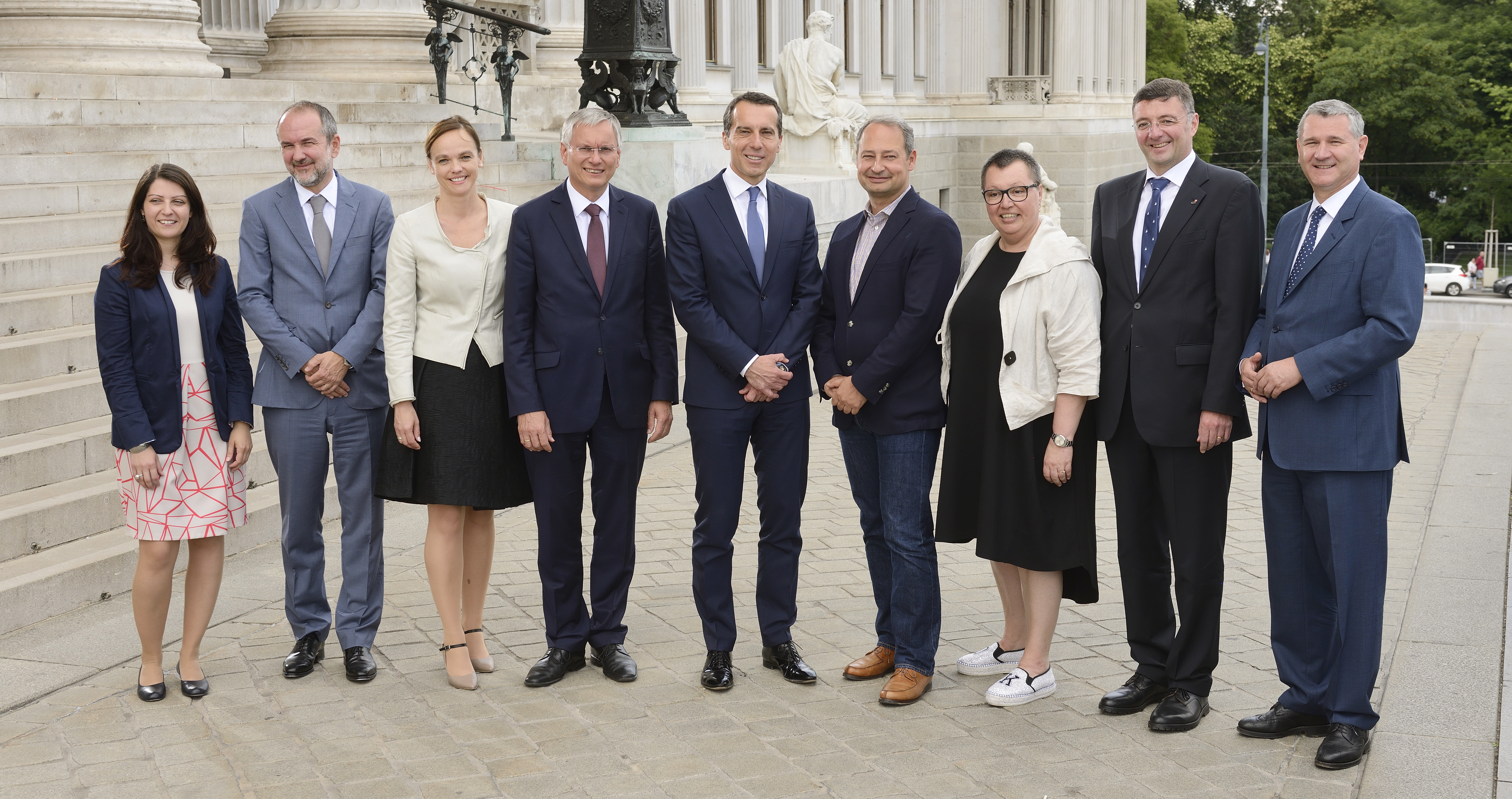 SPÖ-Regierungsmitglieder